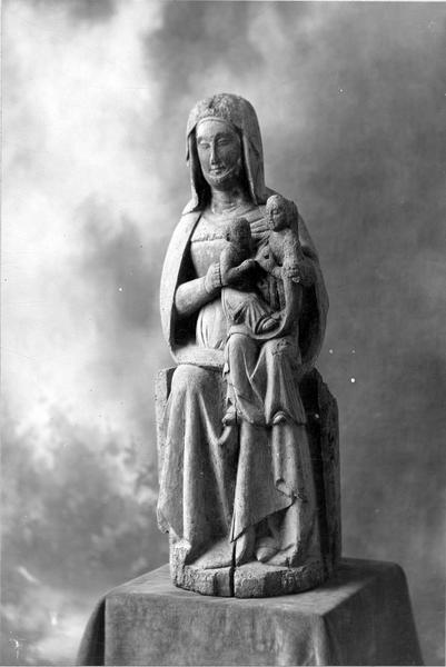 Skulptur in der Kirche Sainte-Marie in Lalizolle